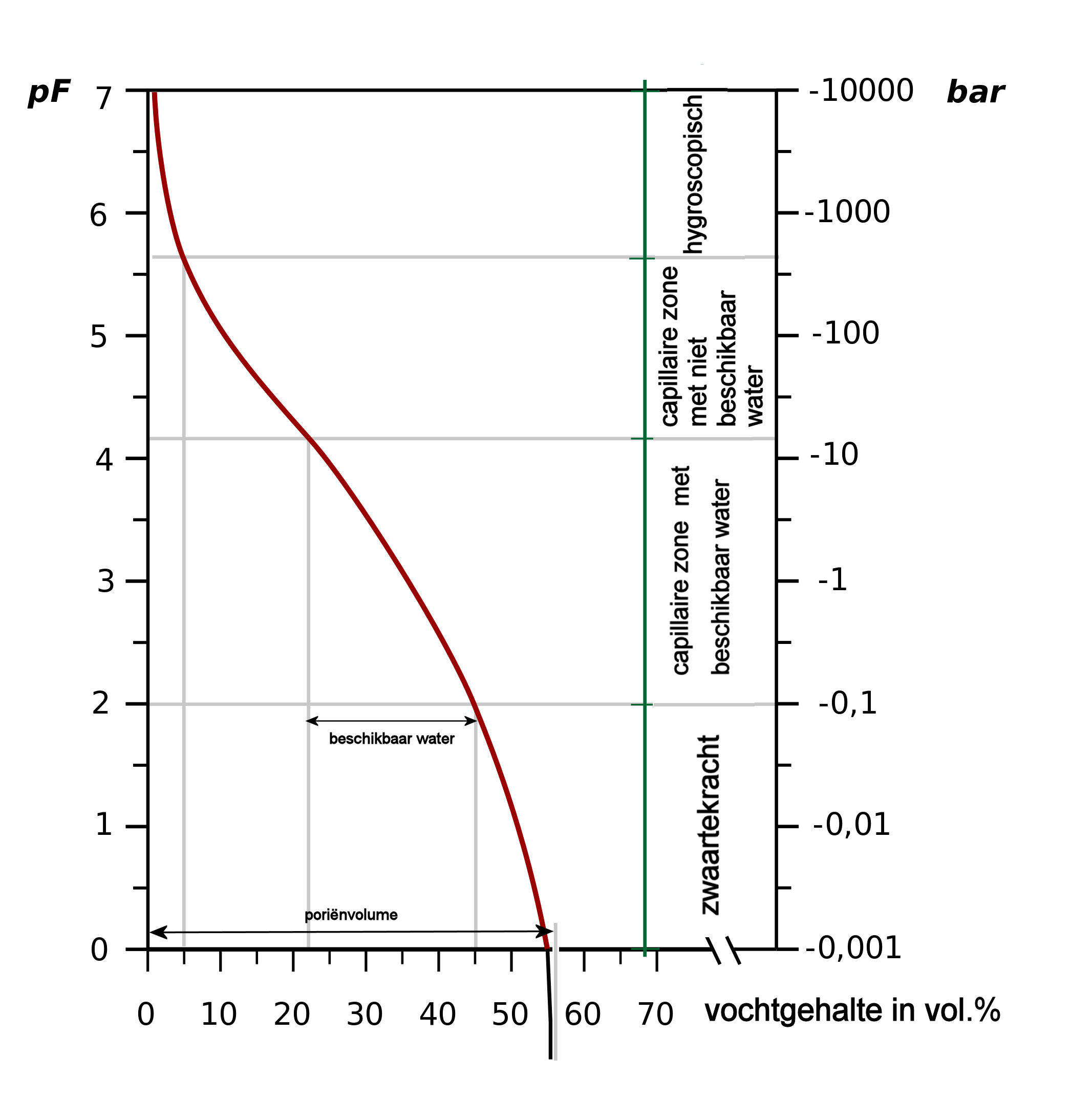 In italiaanse versie nederlandse tekst geplaatst en gespiegeld